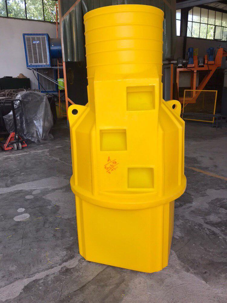 نهول های سنتی (منهول بتنی و منهول آجری) در گذشته فقط در محل ساخته می شدند اما در حال حاظر منهول بتنی پیش ساخته نیز وجود دارد اما منهول های پلاستیکی (منهول GRP و منهول پلی اتیلنی) به صورت پیش ساخته تولید شده وهمین موضوع باعث کاهش بسیاری از هزینه های حمل نقل و نصب و راه اندازی شده است.